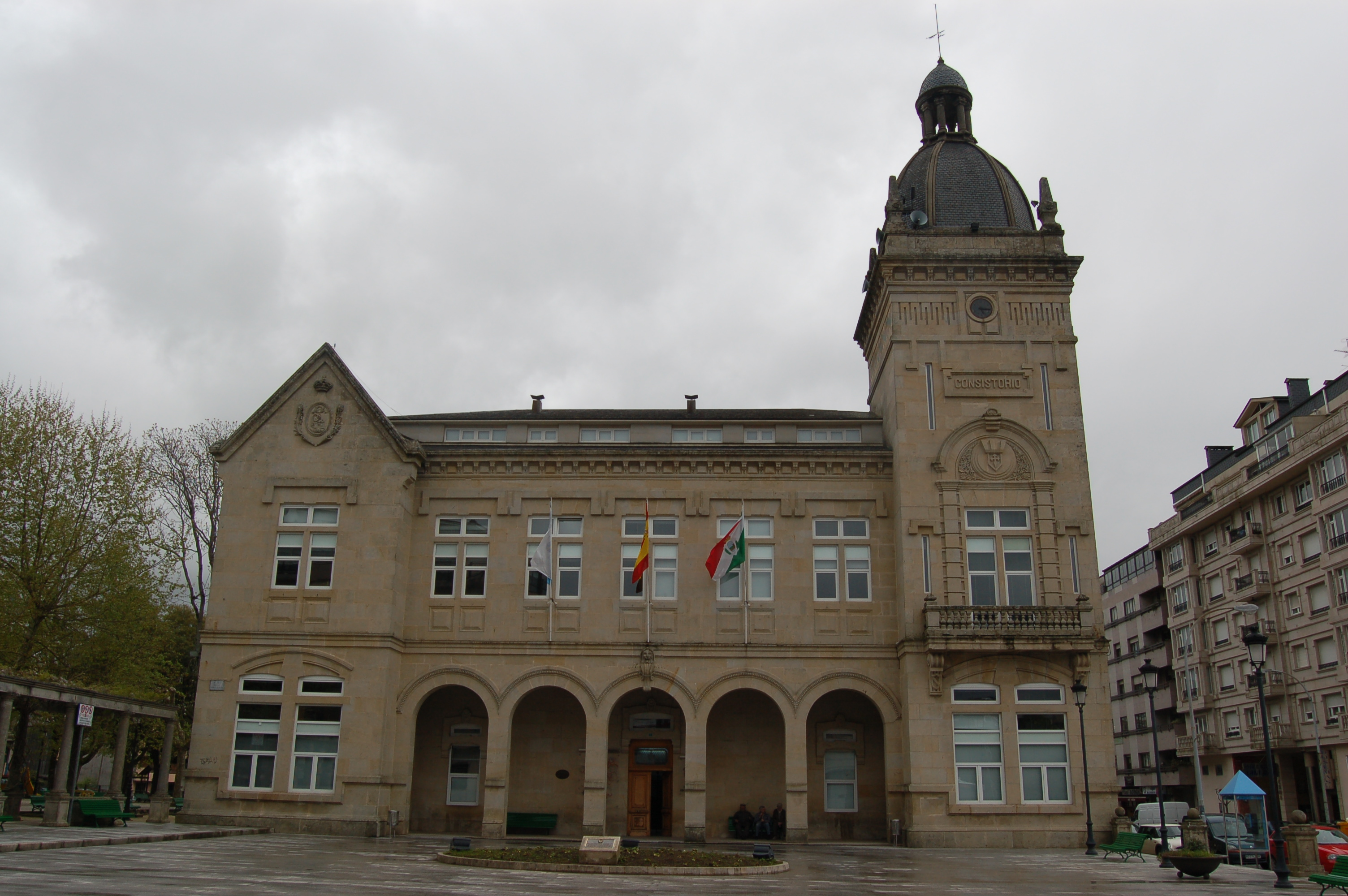 Casa consistorial da Estrada